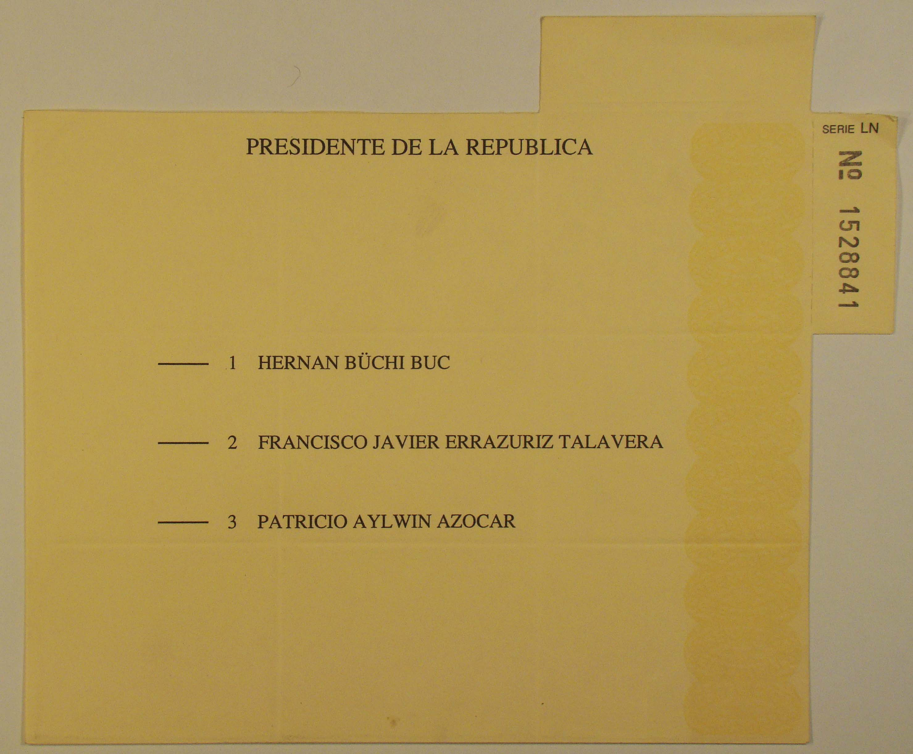 Documento de la época del Regimen militar de Augusto Pinochet en Chile